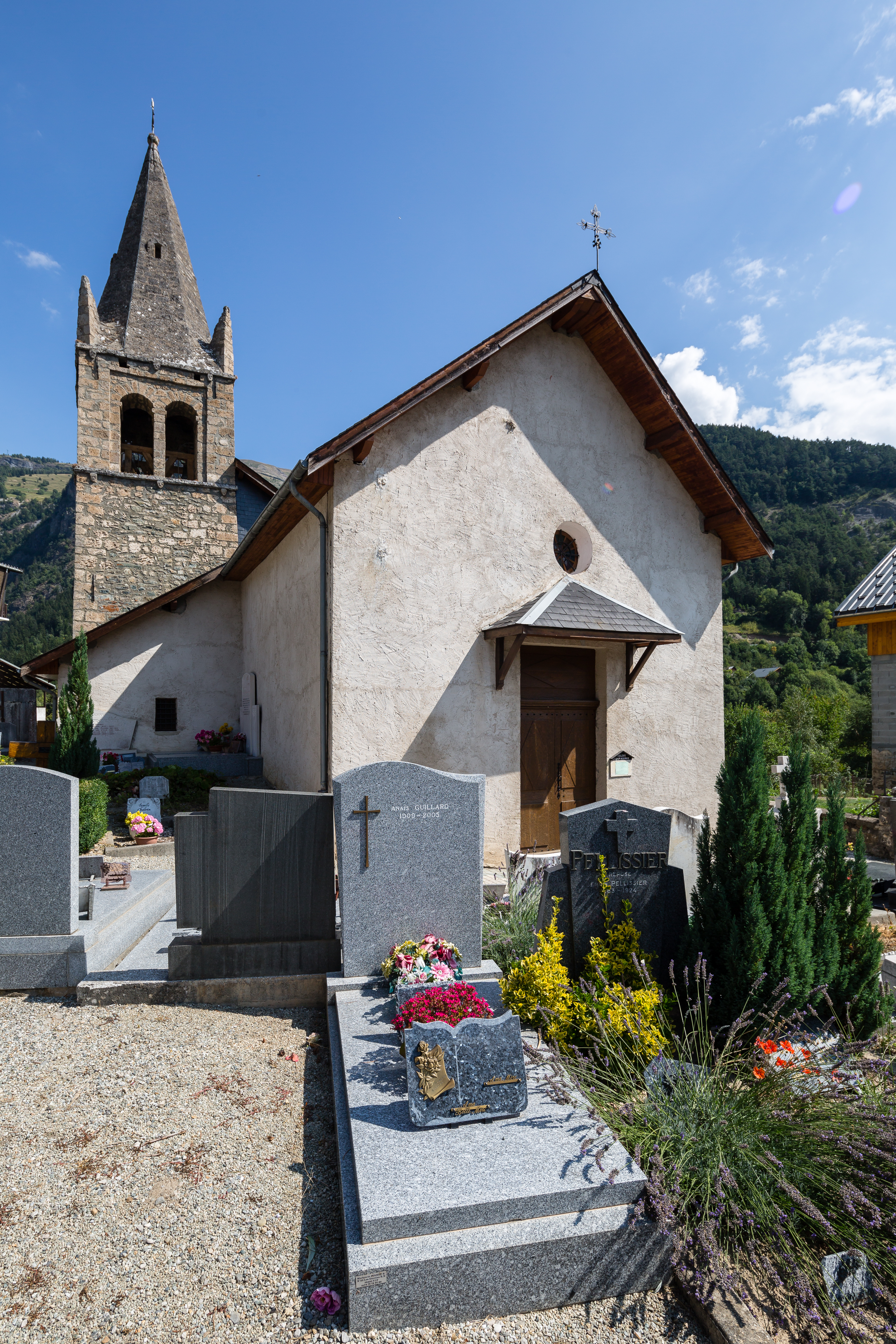 Église Saint-Pierre de La Garde-en-Oisans (France).